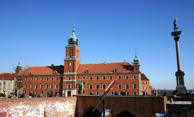 Warszawa (Polska)